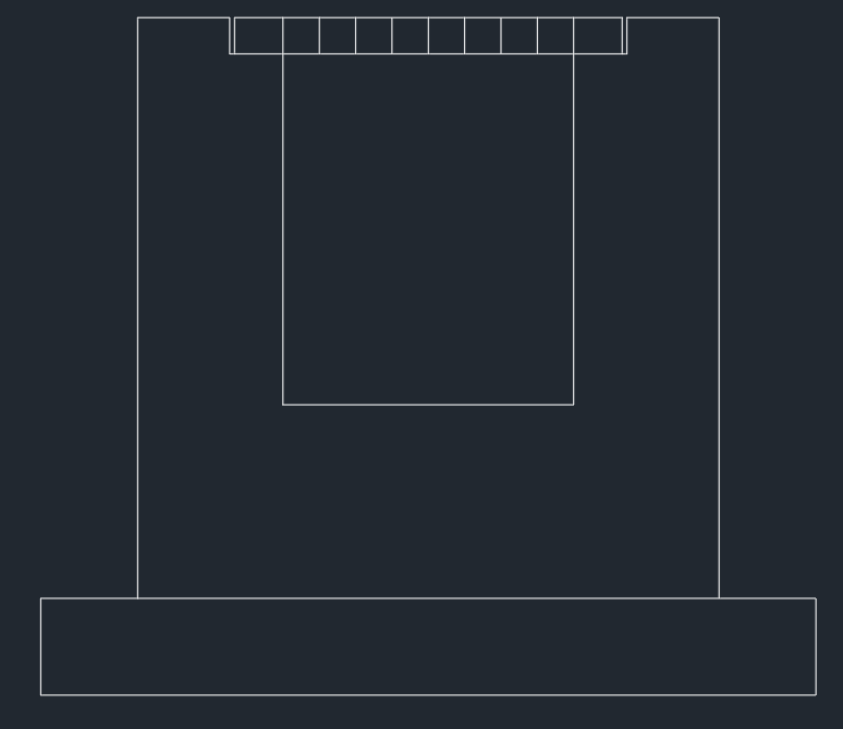 U형 측구 일반도